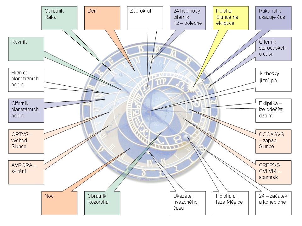 Schéma astronomické části Staroměstského orloje v Praze